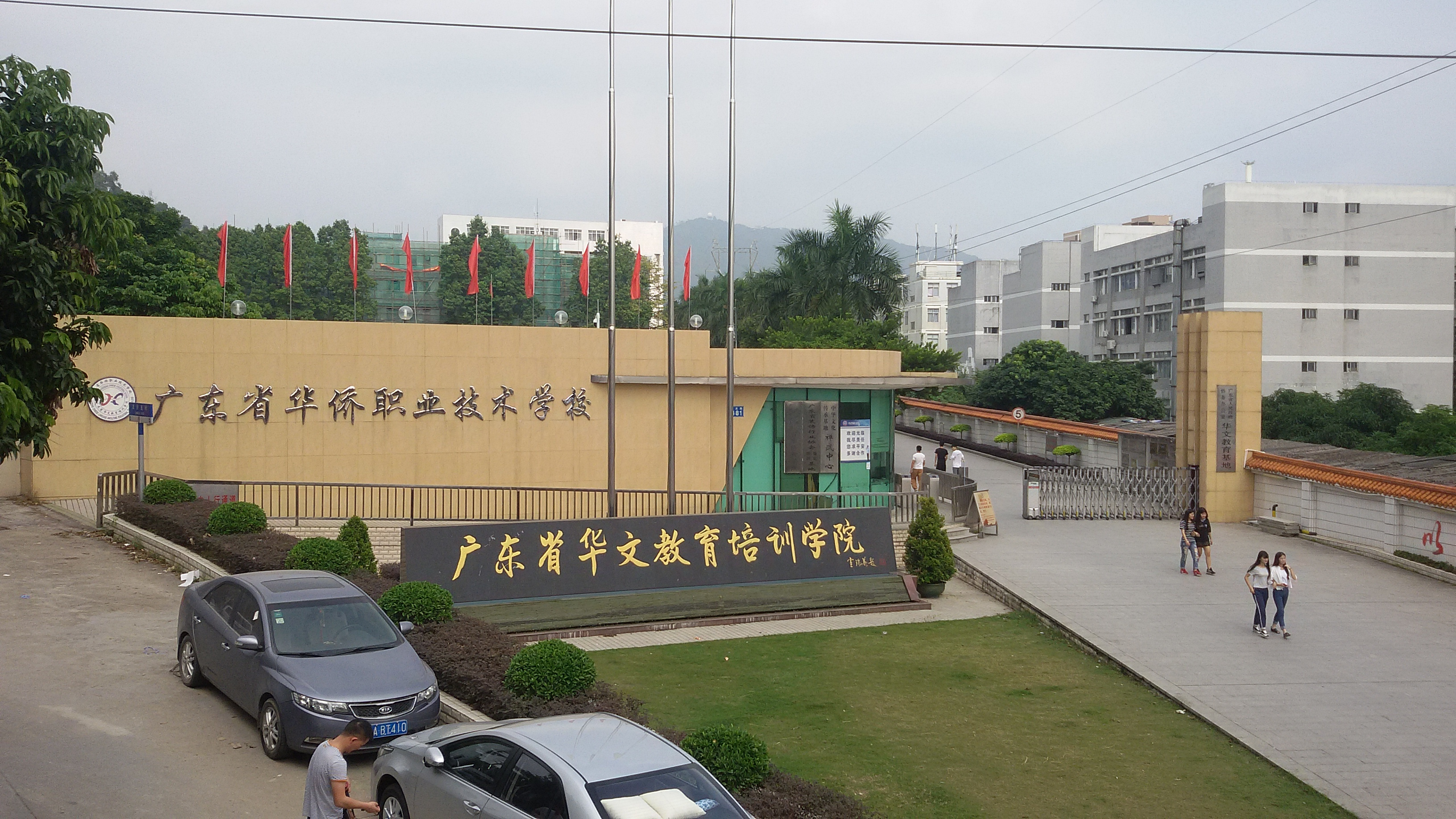 粵語: 廣東省華僑職業技術學校同埋廣東省華文教育培訓學院